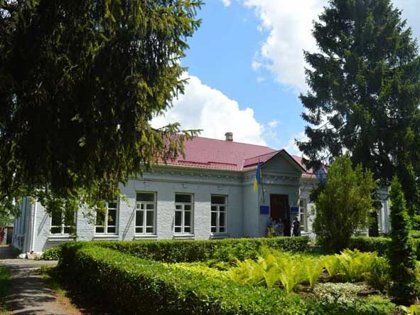 Головний корпус Хмельницького обласного еколого-натуралістичного центру учнівської молоді